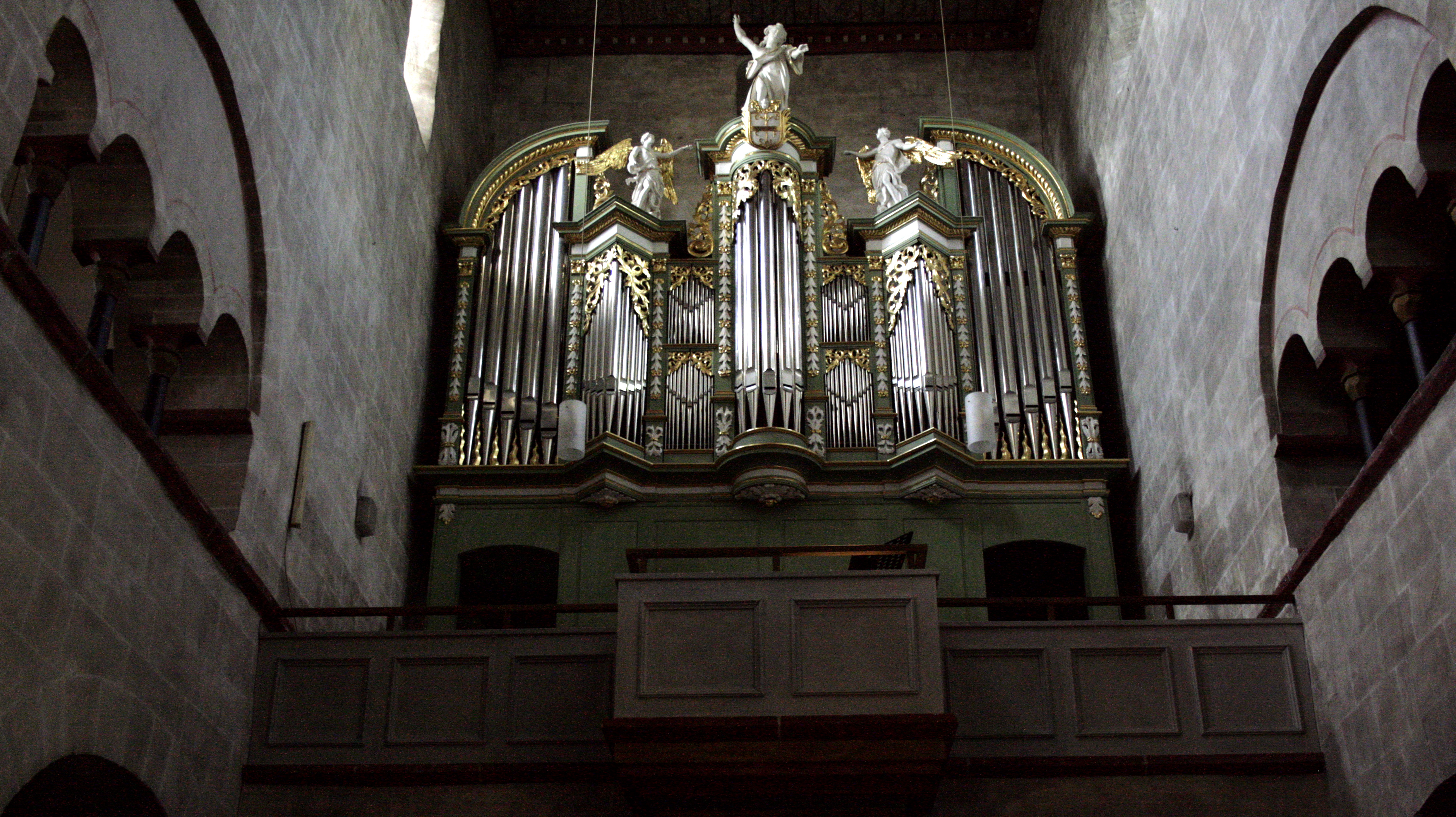 Lubentiusstift Dietkirchen, Deutschland, Orgel